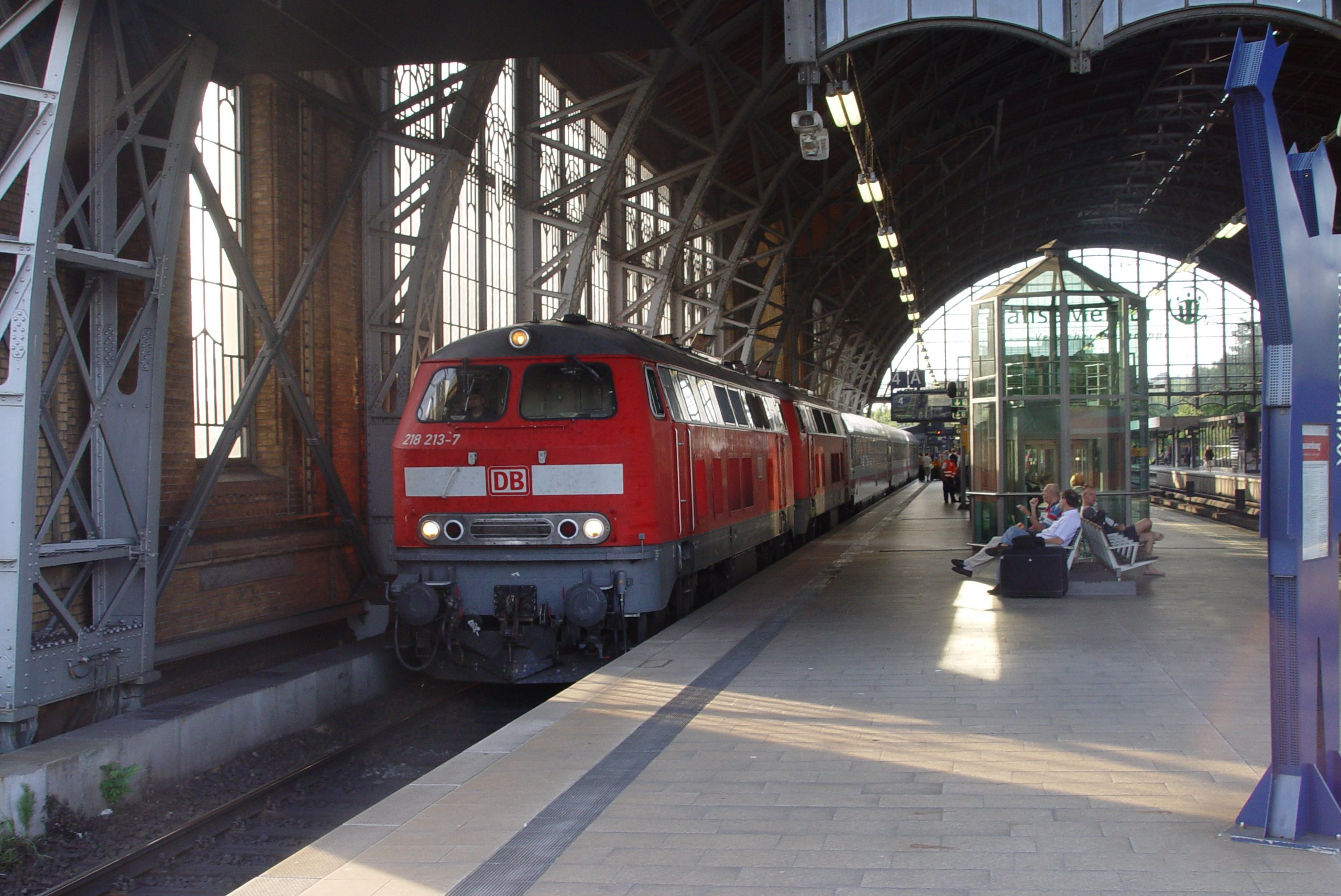 Zwei Loks der BR 218 mit Intercity von Westerland in Hamburg-Dammtor